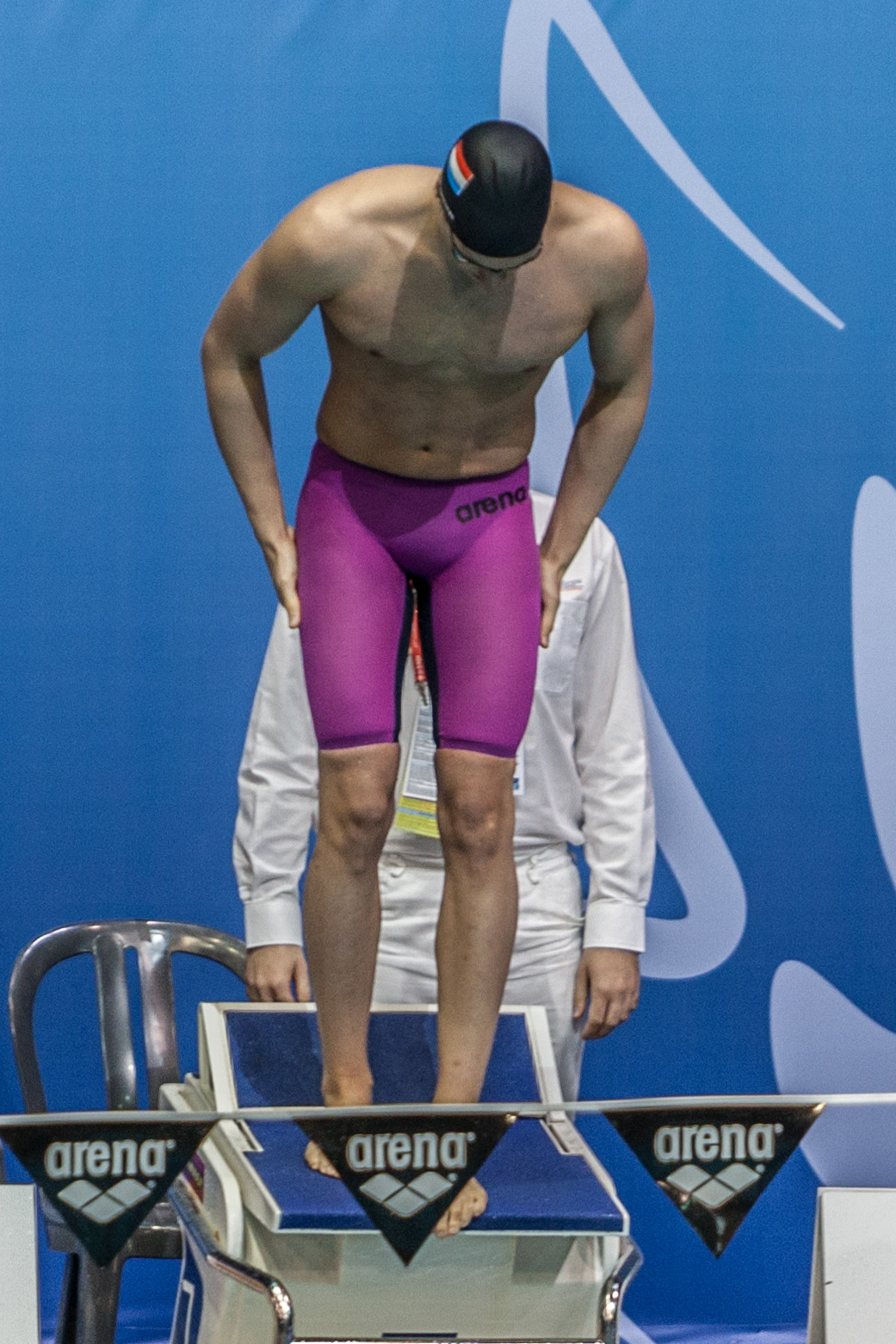 השחיין רפאל סטקיוטי באליפות אירופה בשחייה בבריכות קצרות, נתניה 2015